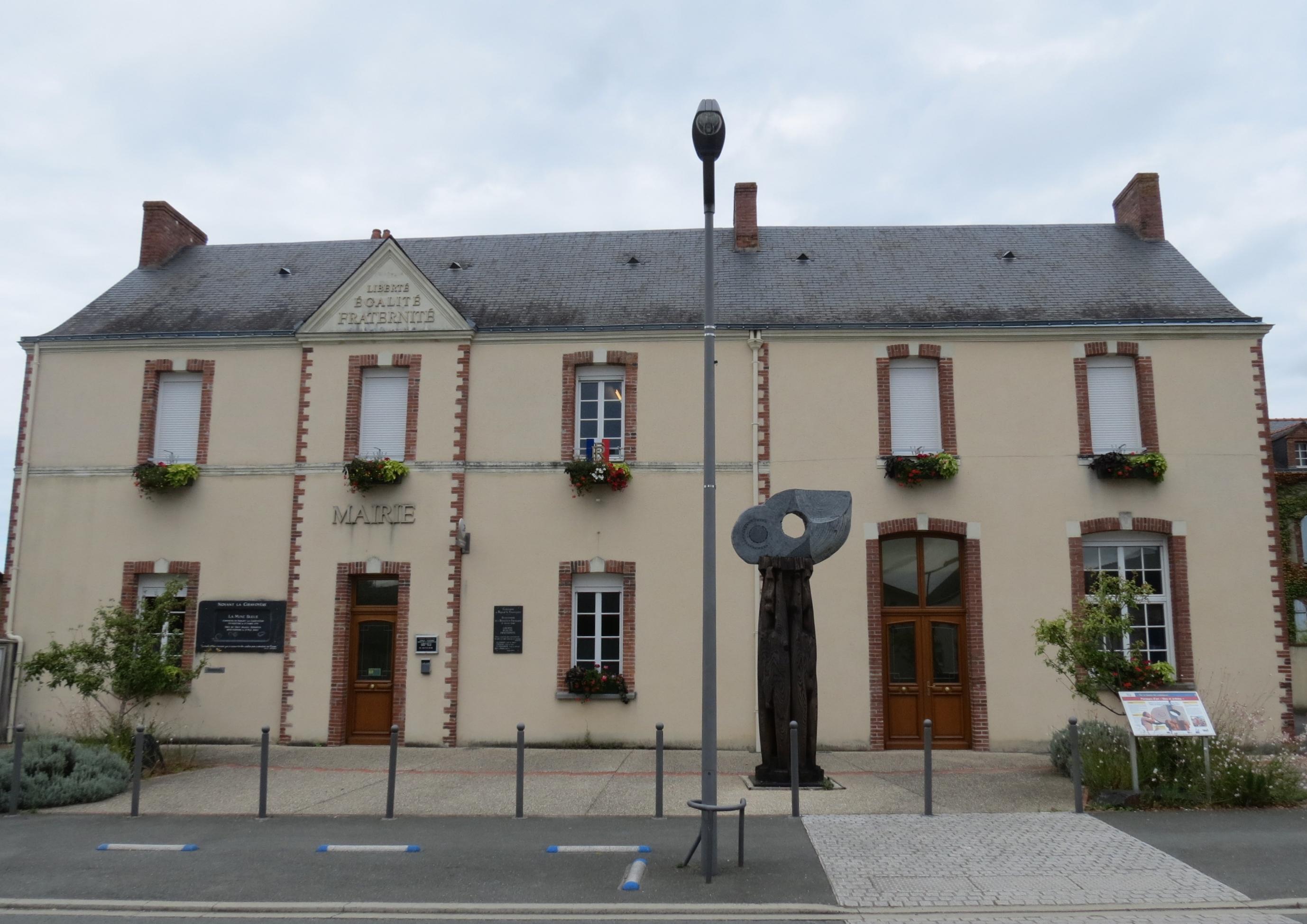 Noyant